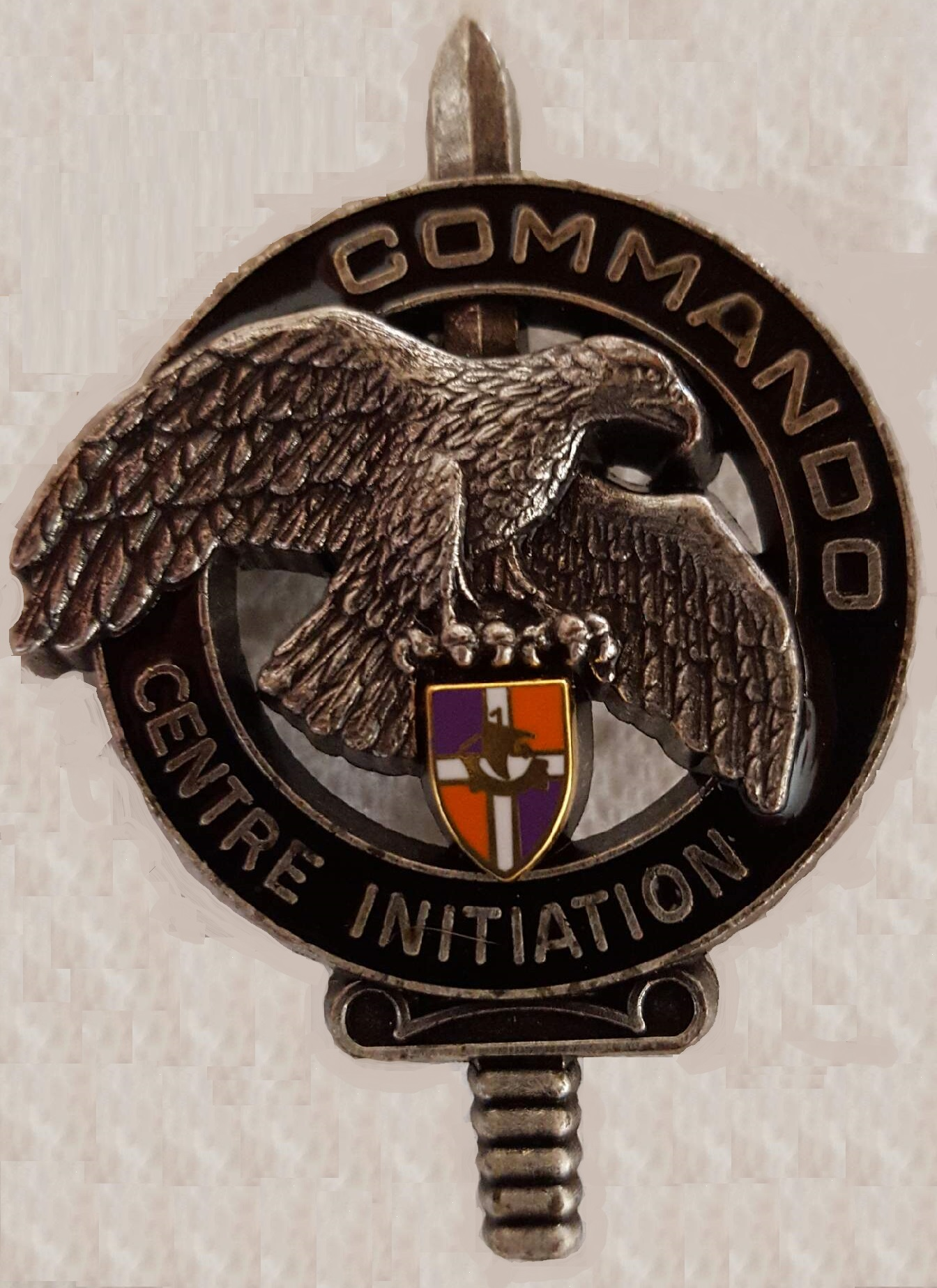 Brevet Initiation Commando 24ème régiment d'Infanterie version recadrée